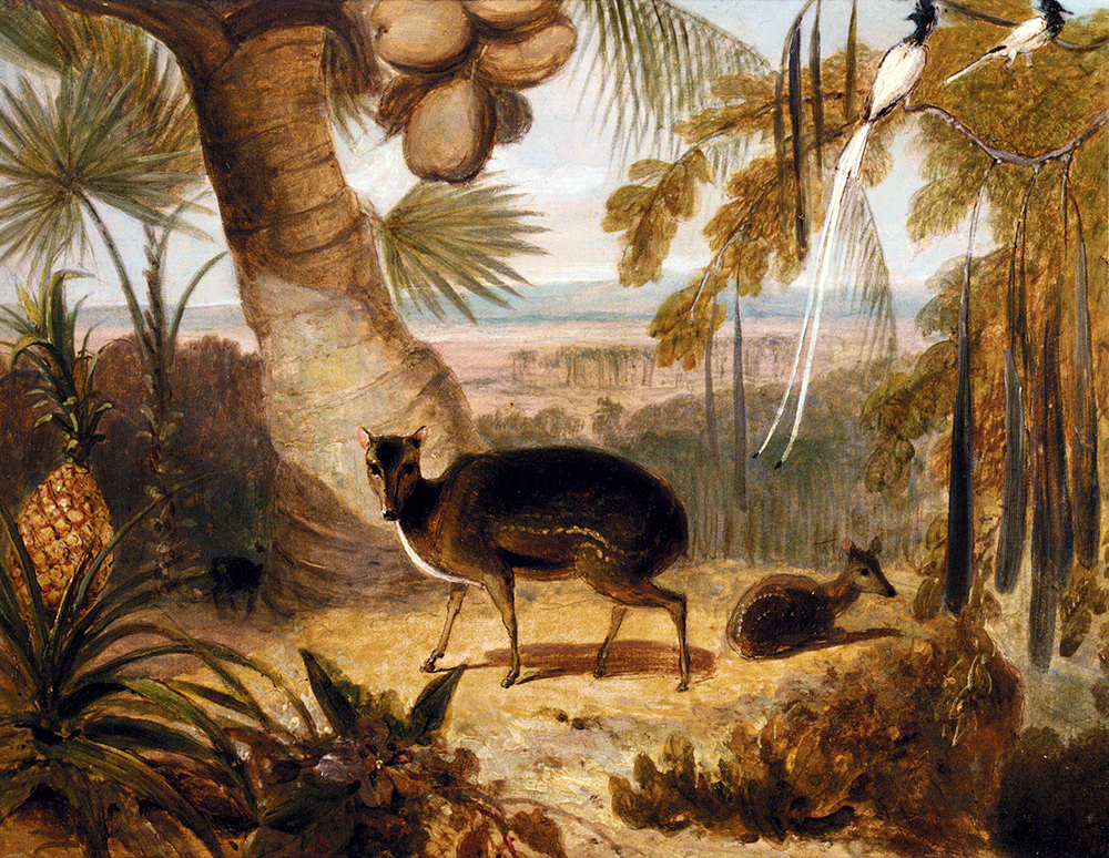 Musk Deer, And Birds Of Paradise